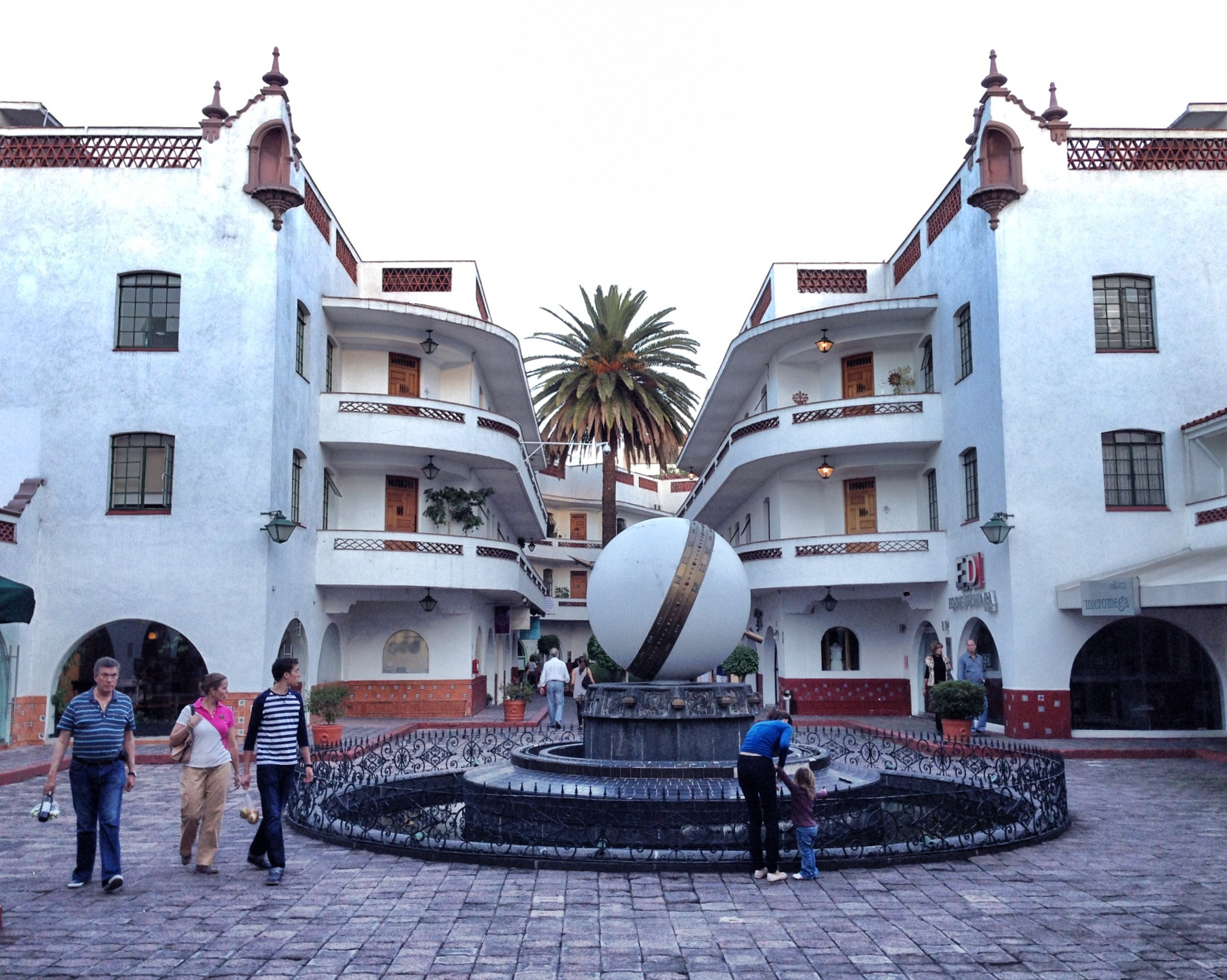 Pasaje Comercial, Polanco Architect Francisco Serrano, 1938